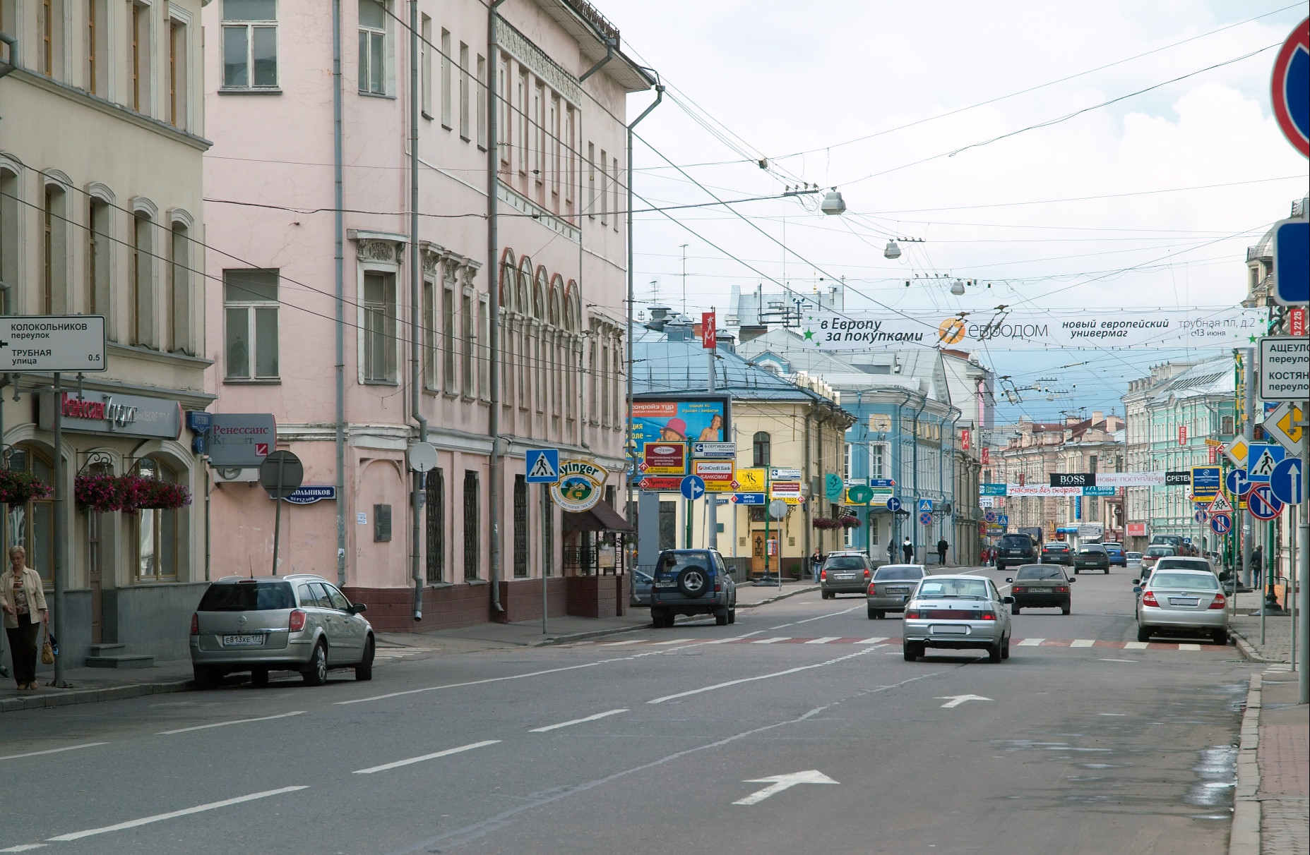 Улица Сретенка, Москва.